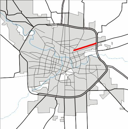 Ubicación Avenida Malvinas Argentinas - Bulnes